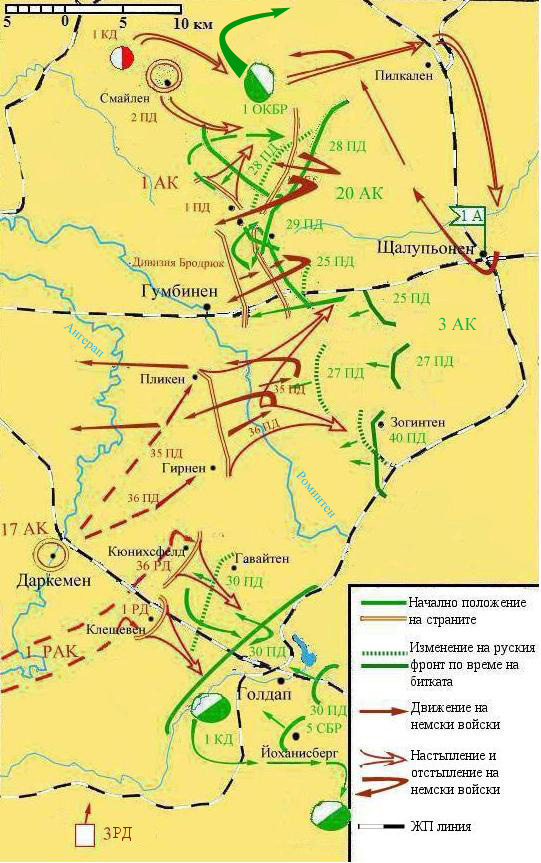 Схема на сражението при Гумбинен. Map of the Gumbinen battle.